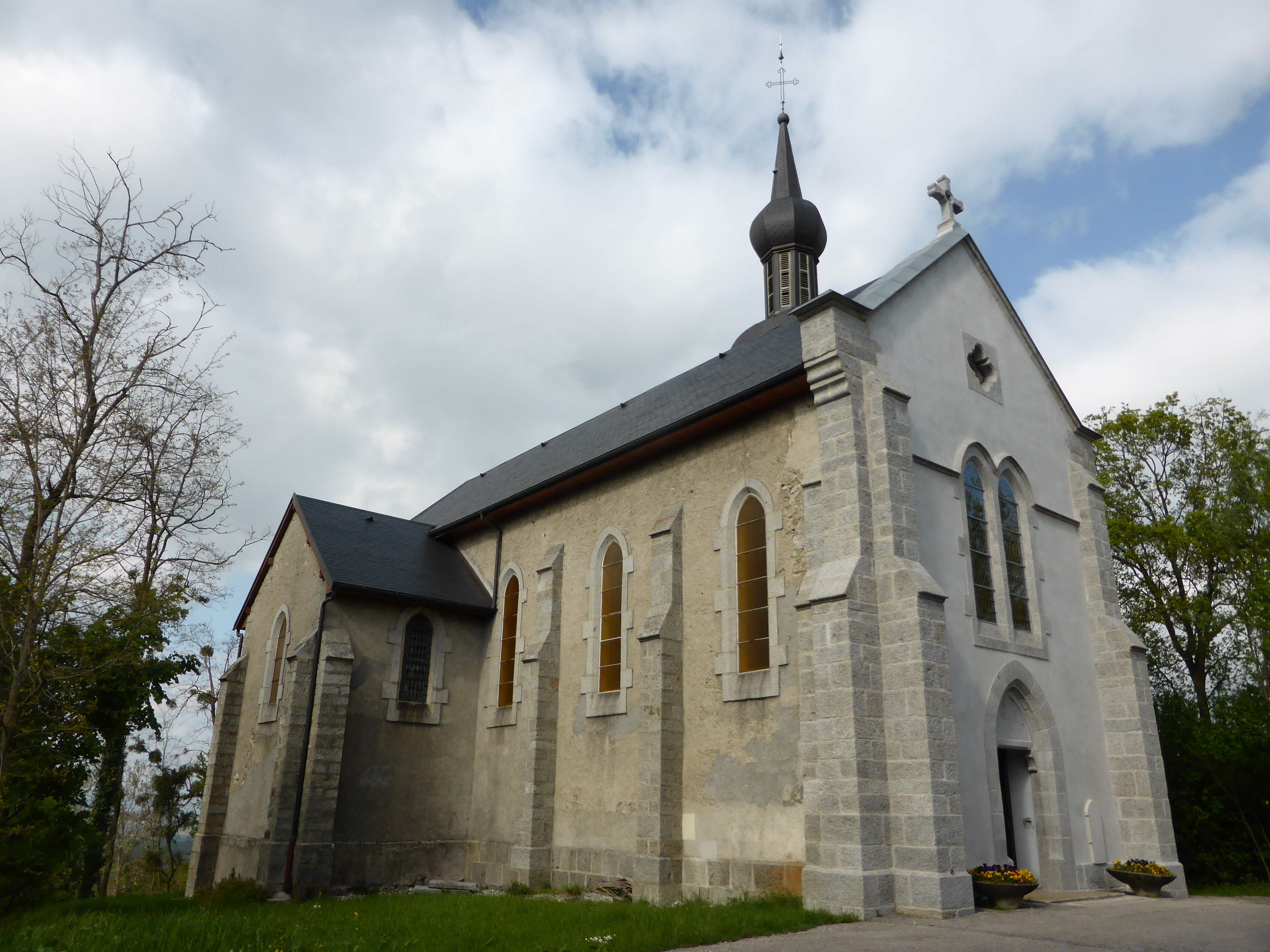 Église de Vers en Haute-Savoie, France.